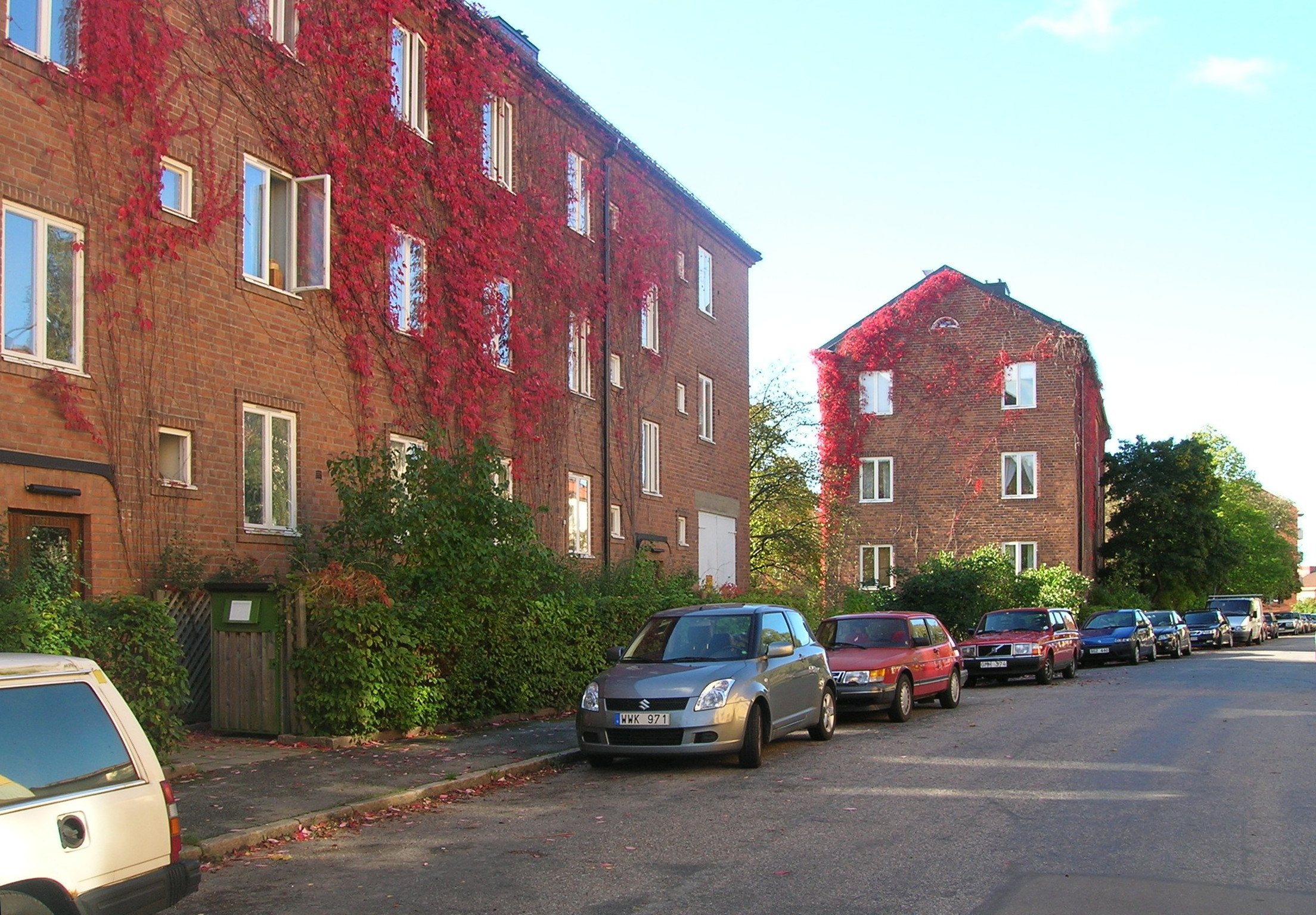 Barnrikeshus på Bolmensvägen, Årsta, Stockholm. Husen ritades av Ernst Hawerman, första inflyttning skedde i juli 1943.